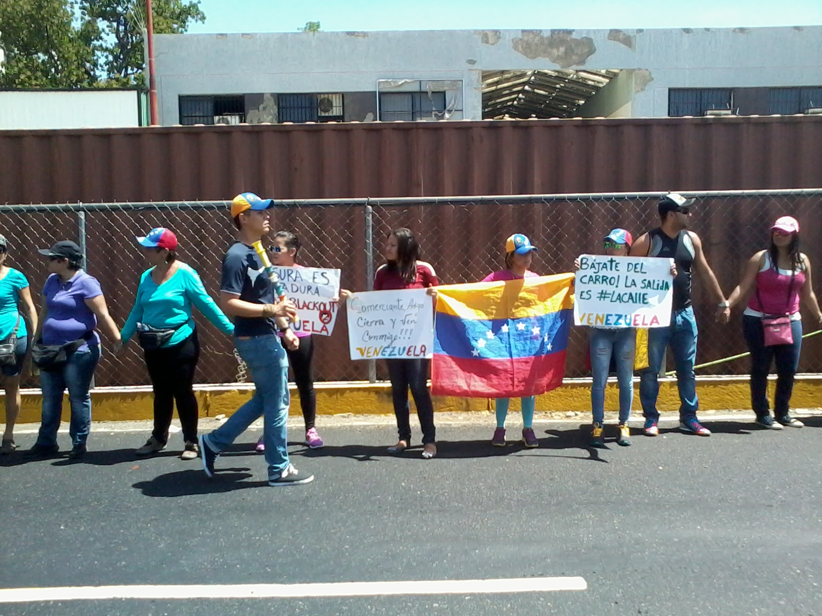 Cadena humana en el sector Centro-Norte de Valencia durante un quinto día de protesta estudiantil unida con la sociedad civil en Venezuela